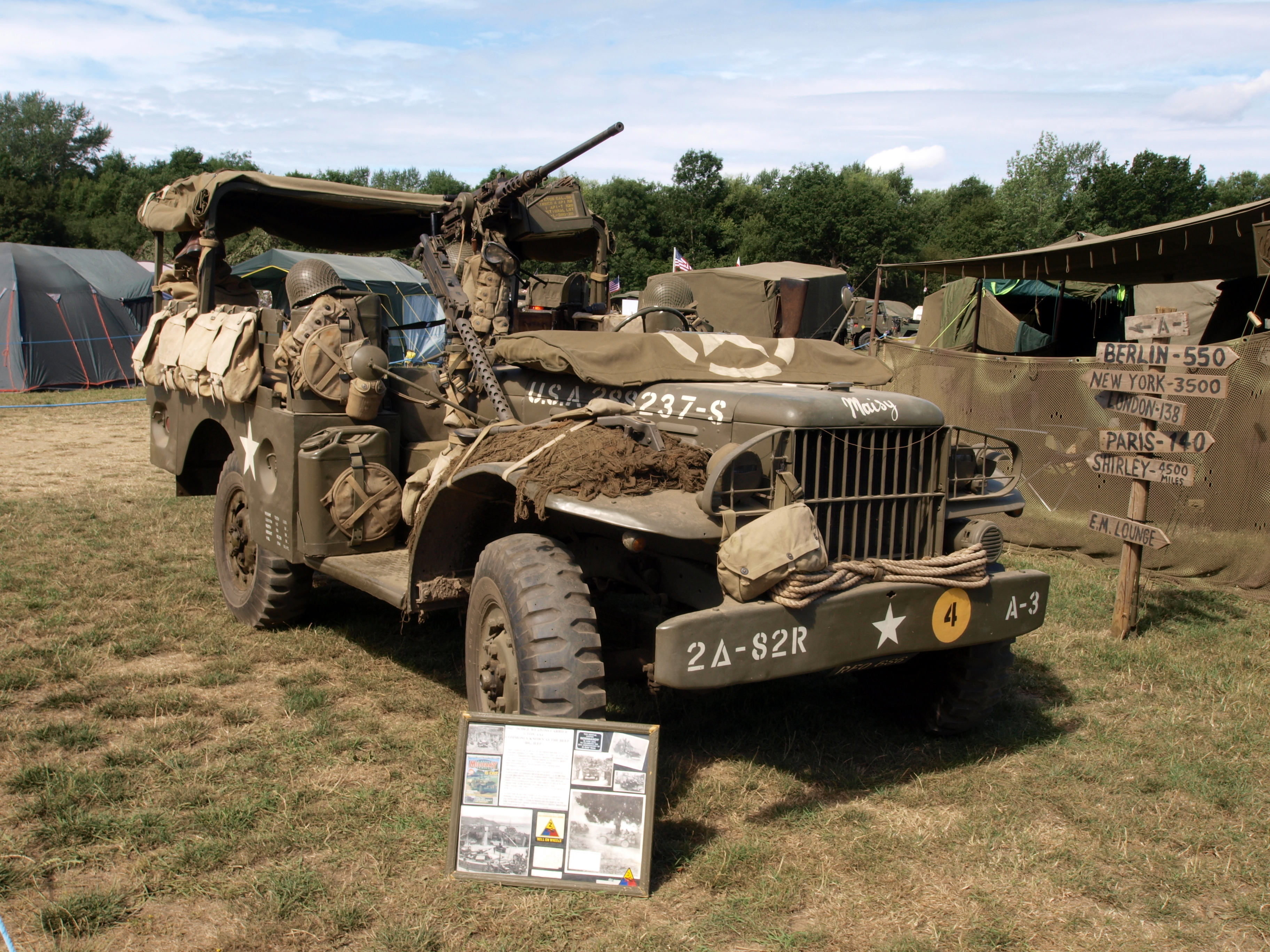 Dodge WC-52, USA 288237-S